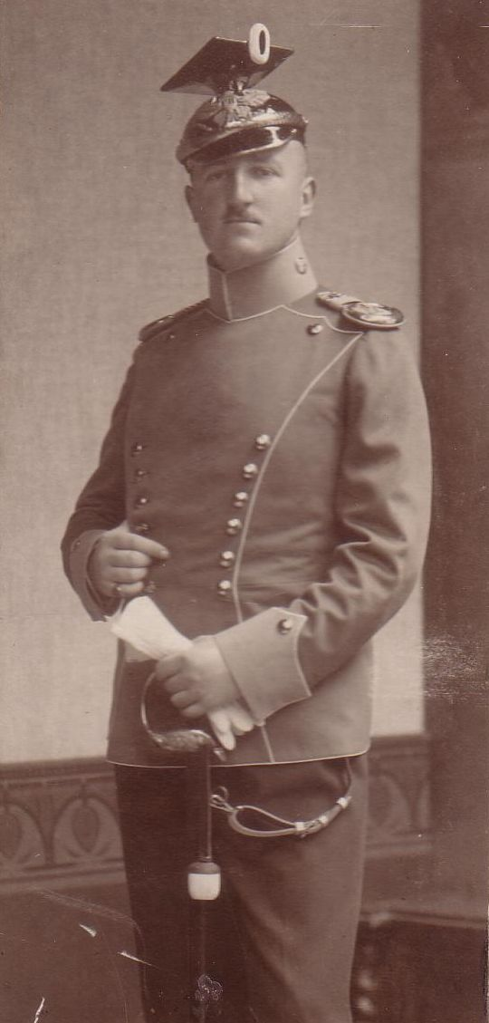 Fotografie von Erwin Moeller (1883-1966) als Soldat des Litthauischen Ulanen-Regiments Nr. 12